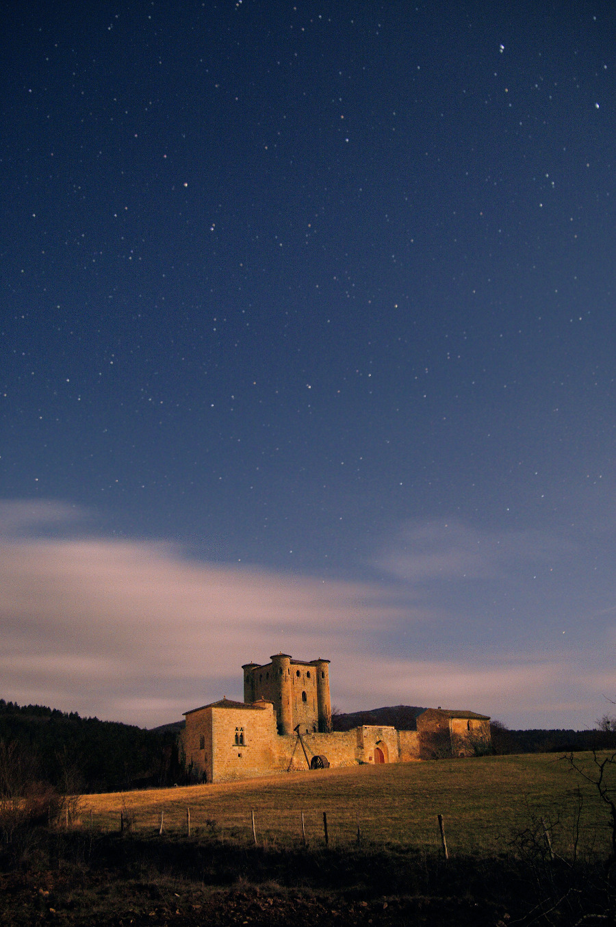 Photo prise de nuit du château d'Arques (Aude, 11)